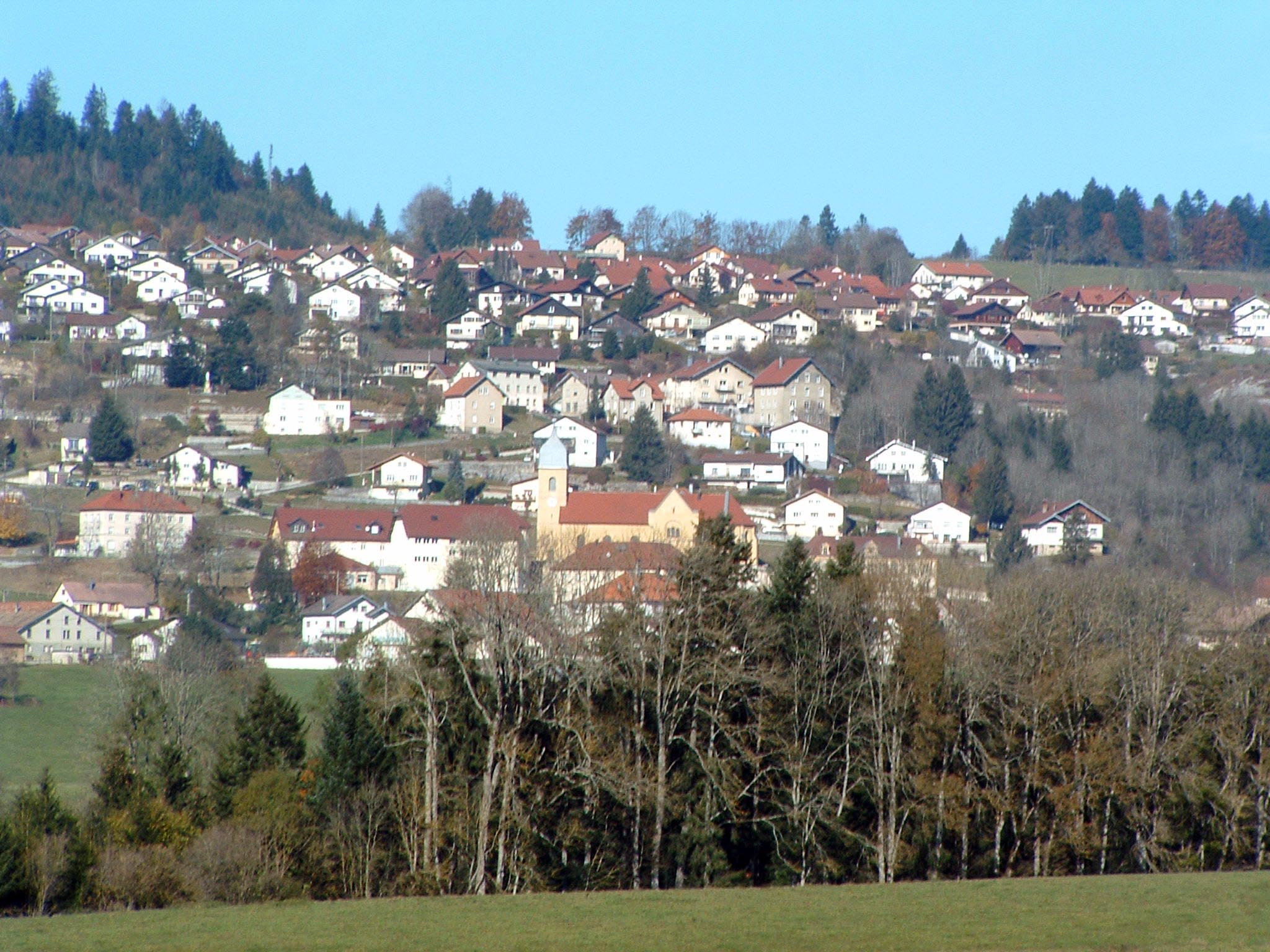 Vue du bourg-centre depuis le hameau des Chézières